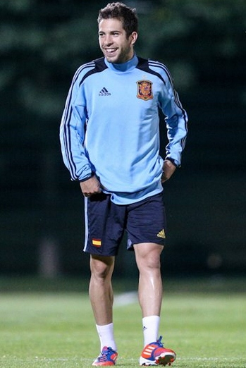 Жорди Альба/